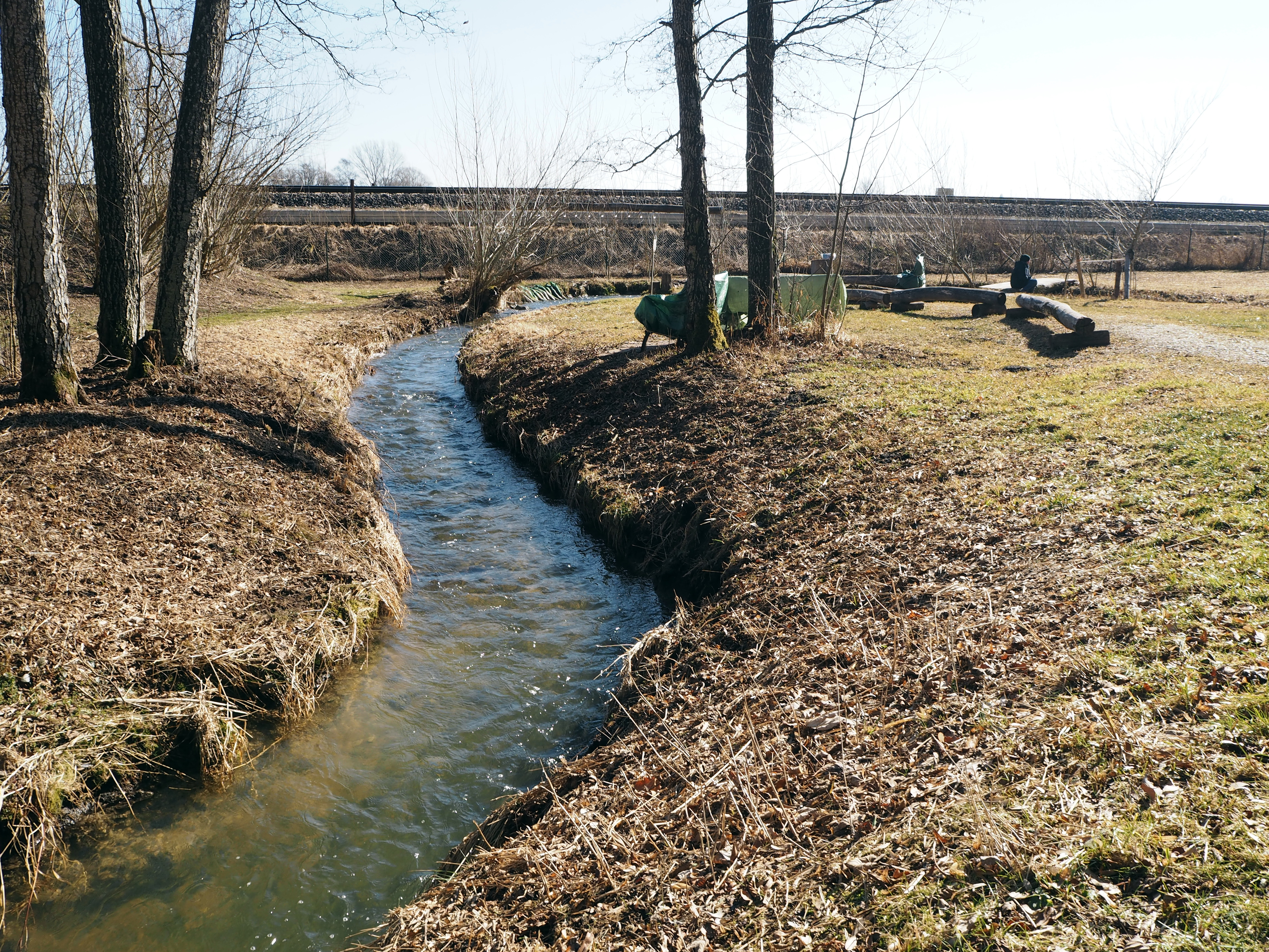 Naturlehrgarten Mindelheim, Brunnenbach. Im Hintergrund die Bahnstrecke KB971 Buchloe-Memmingen